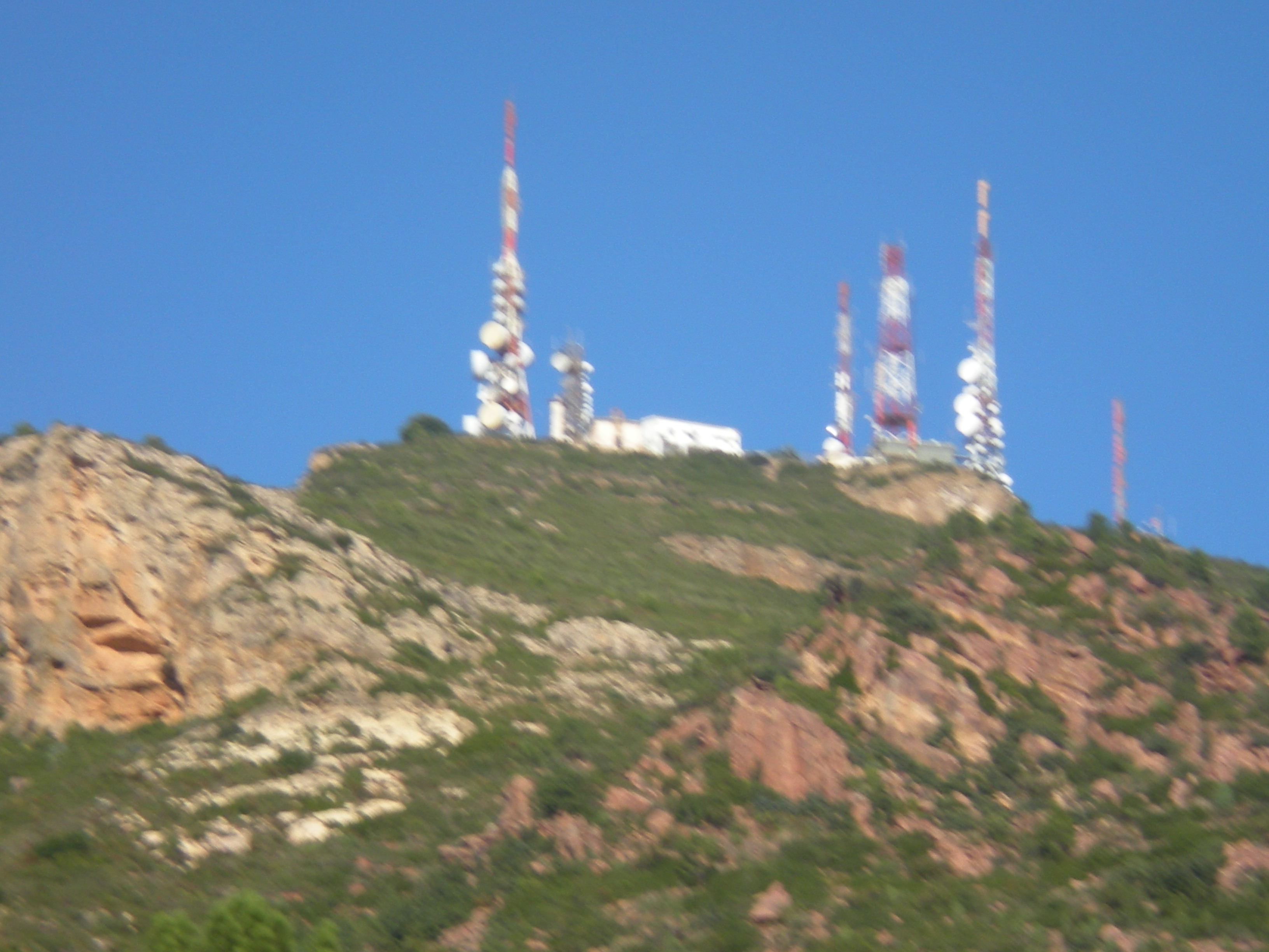 Vista de las antenas del repetidor de televisión situado en el monte de El Bartolo, en pleno Desierto de las Palmas, Benicasim.